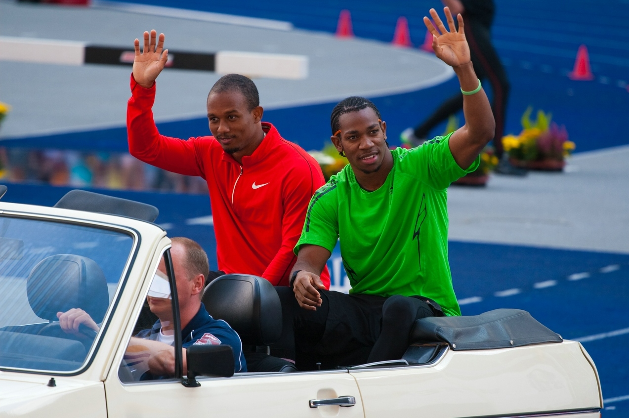 Yohan Blake, Michael Frater, 100m , Yohan Blake Weltmeister Daegu 2011